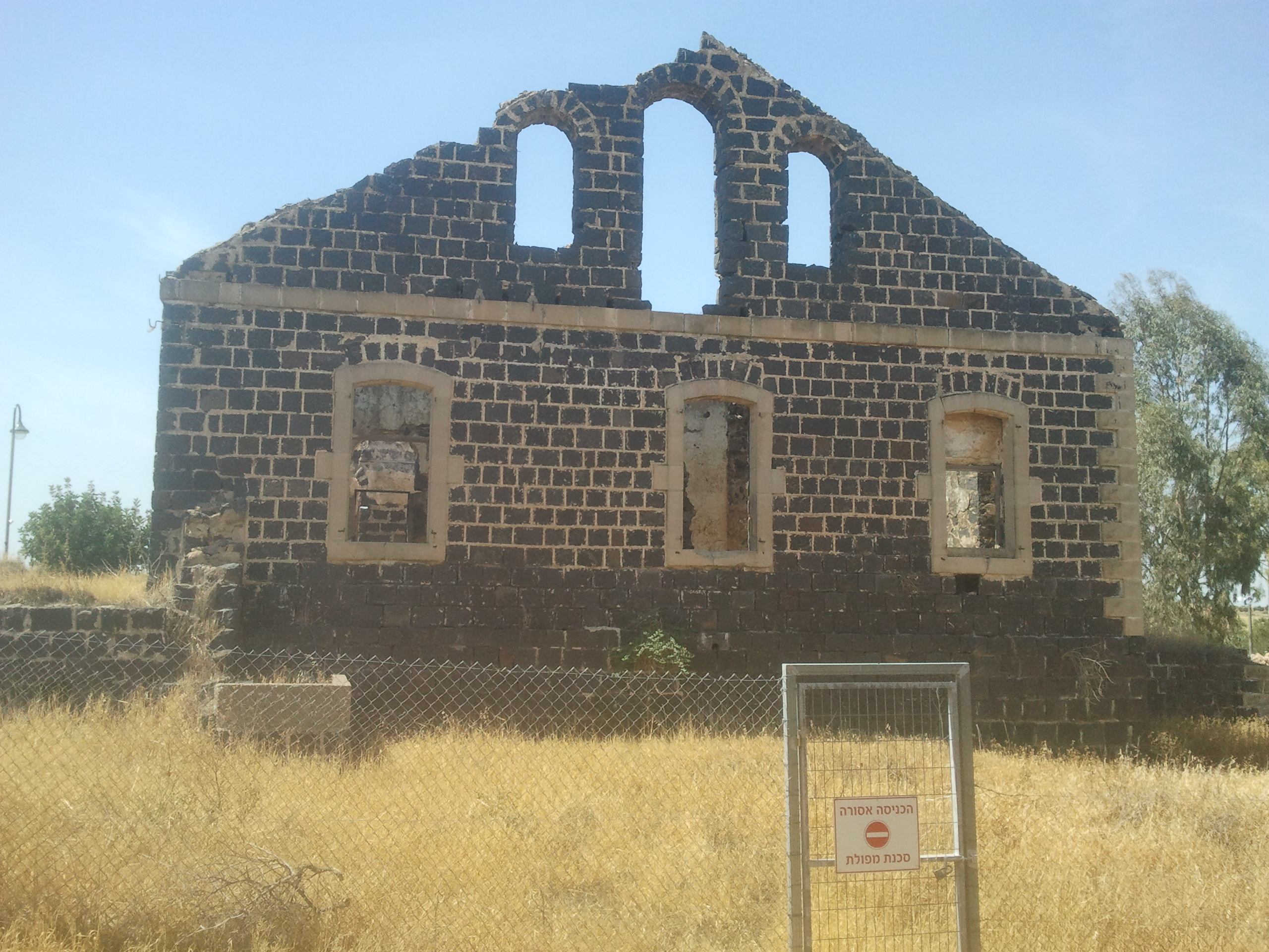 אחוזת פוריה (חוות פוריה) הייתה התיישבות שהוקמה בשנת 1910 ברכס פוריה על ידי חברת אחוזת סנט לואיס. מבני האחוזה השוכנים ביישוב פוריה עילית, הוכרזו כאתר מורשת בישראל.